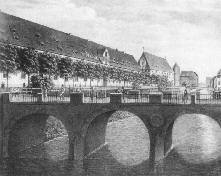 „Lein-Brücke in Hannover“; Lithographie eines unbekannten Künstlers, signiert „St. v. G.“, um 1830; im Bestand des Historischen Museums Hannover; Quelle: Bernhard Dörries, Helmuth Plath (Hrsg.): Alt-Hannover / 1500-1900 / Die Geschichte einer Stadt in zeitgenössischen Bildern 1500 1900, Heinrich Veesche Verlag Hannover, vierte, verbesserte Auflage 1977, S. 77, 130, ISBN 3 87223 0247